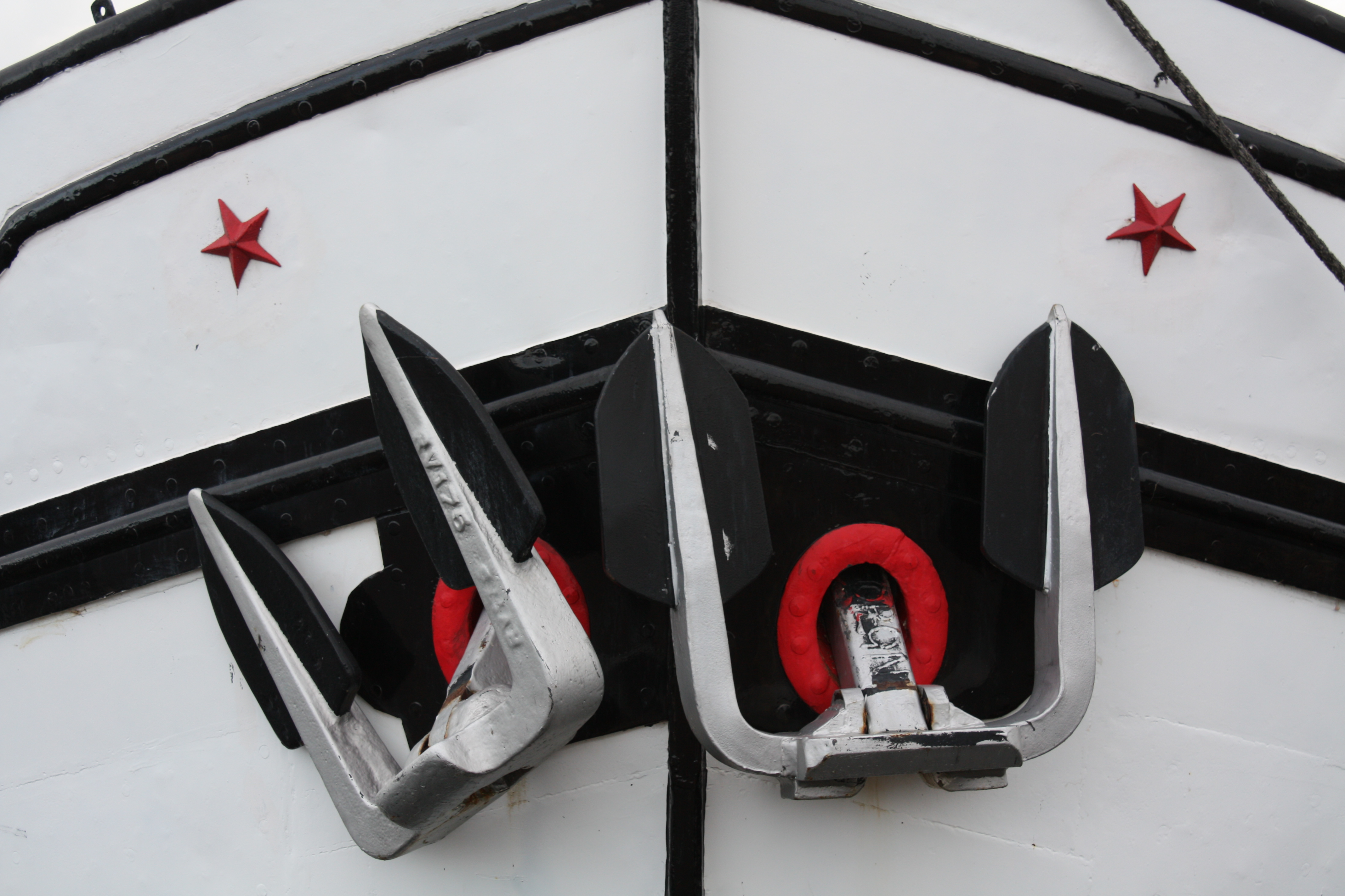 Bug eines niederländischen Binnenfrachtschiffs mit zwei Ankern, Amsterdam